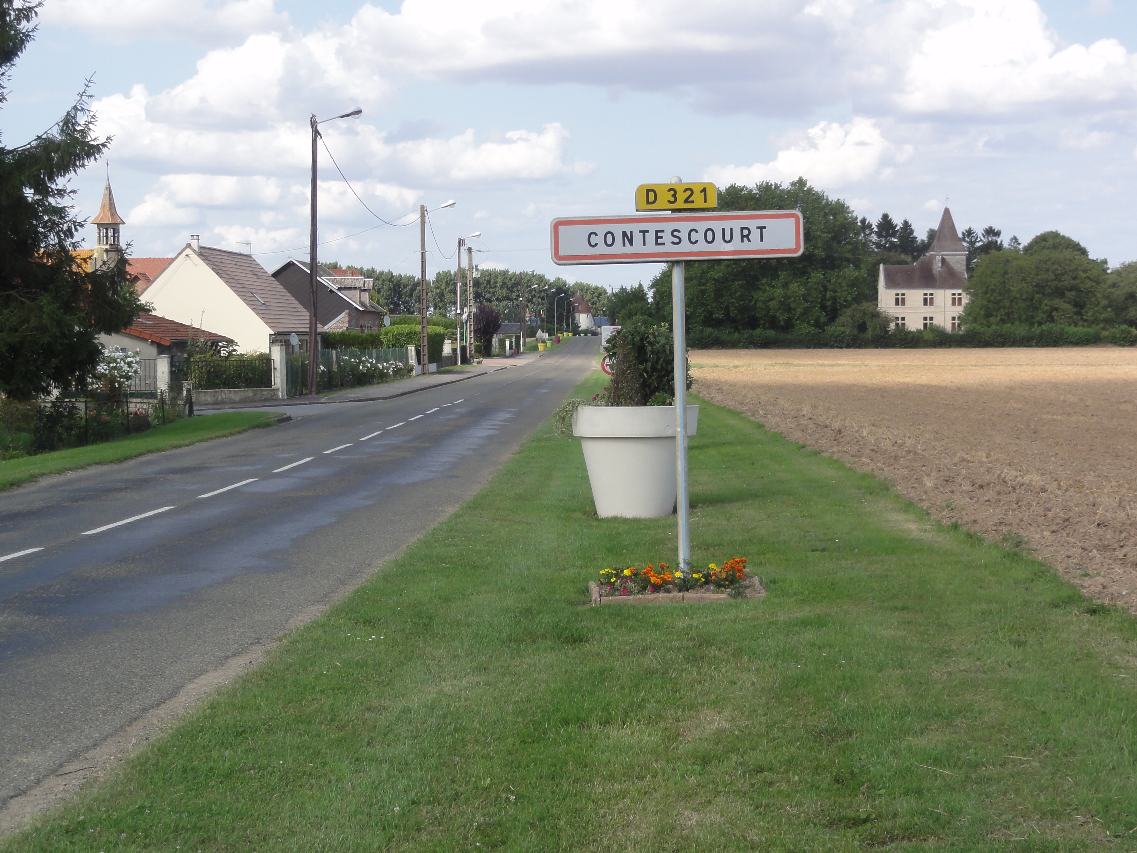 Contescourt (Aisne) city limit sign